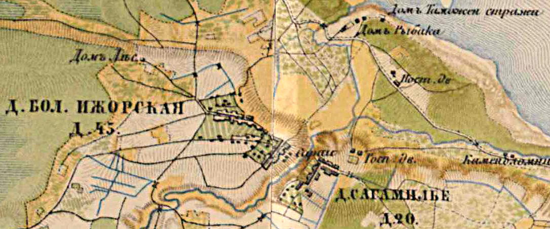 Деревня Большая Ижора на карте 1885 года.